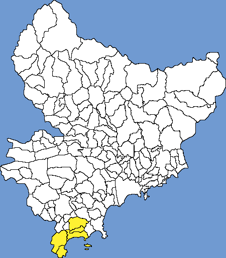 Communauté d'agglomération des Pays de Lérins. Positionnement sur le département maralpin.